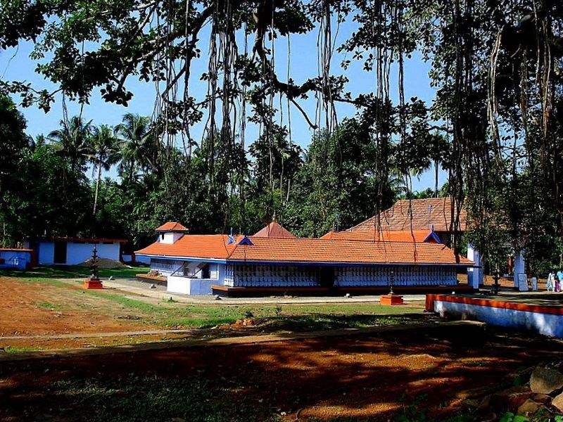 Puthukavu Devi Temple, Kodakara